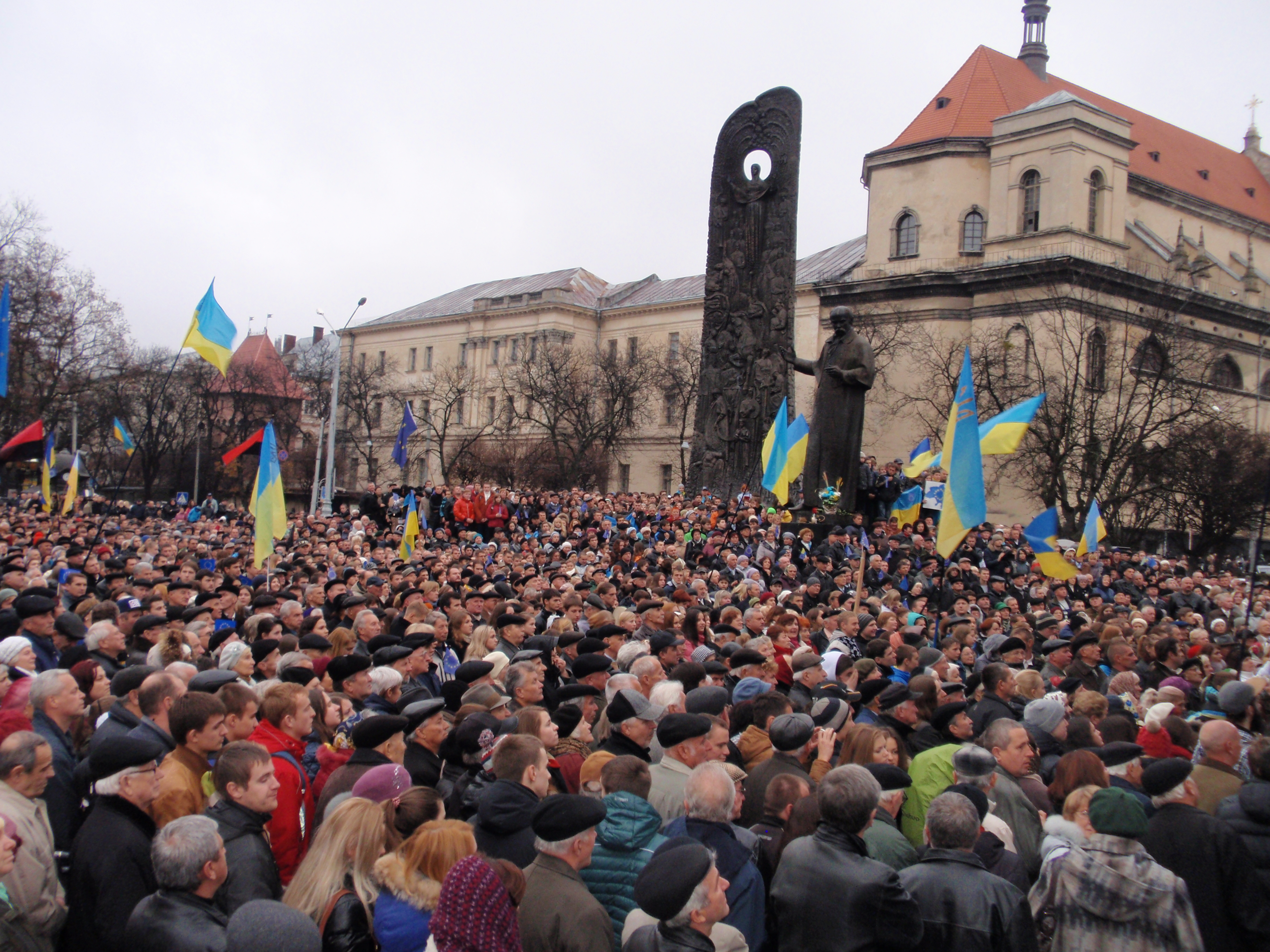 Euromaidan in Lviv (24.11.2013)